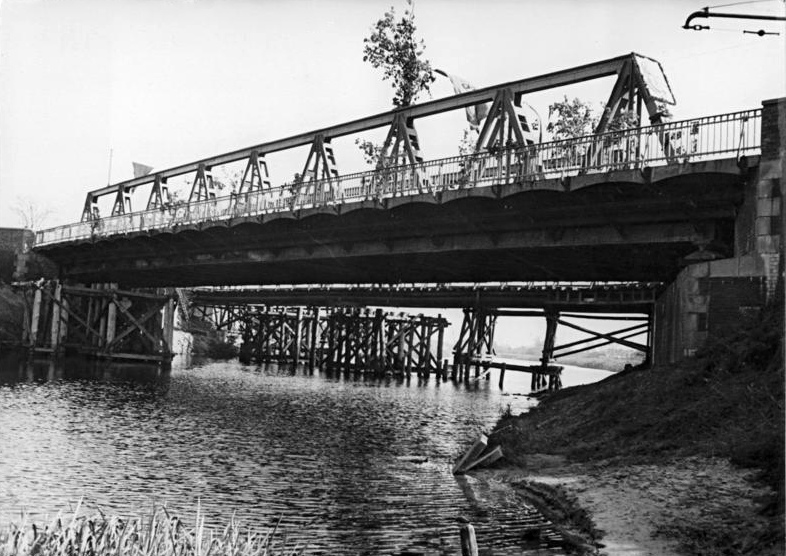 Berlin, Alt-Glienicker Brücke Illus Köhler 14.10.50 Alt-Glienicker Brücke termingerecht fertig. Am 14.10.50 wurde die Alt-Glienickerbrücke in Berlin (Bez. Treptow) feierlich eingeweiht. Sie wurde zu Ehren der Volkswahl am 15.10.50 vorfristig fertiggestellt. UBz: Vorn die neue Brücke, dahinter die jetzt überflüssige Notbrücke.